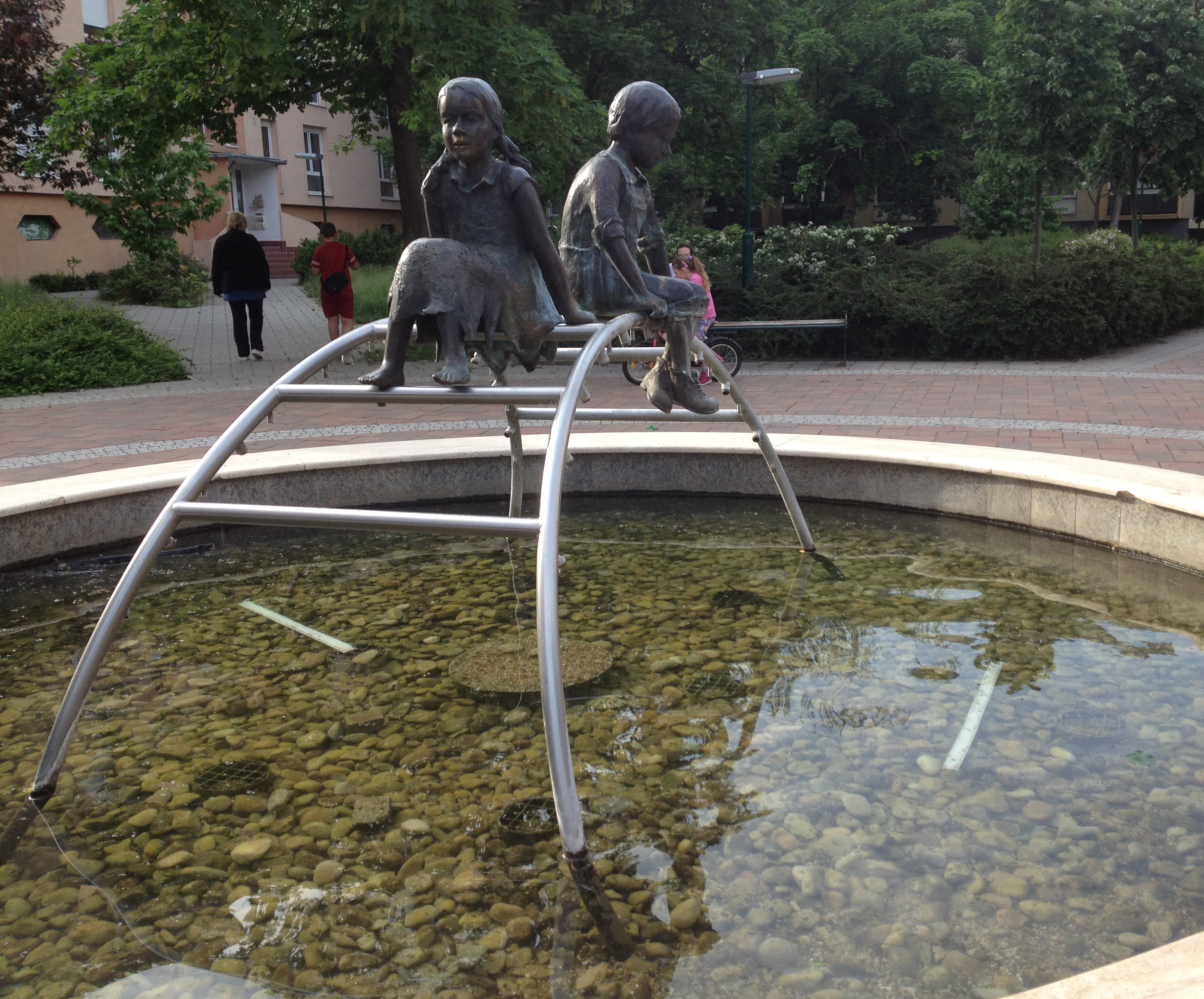 Kréta és Majoranna (Szabó Éva és Sörös Rita alkotása, 2008, anyaga bronz és krómacél), Kaposvár, Béke-Füredi lakótelep (Szivárvány játszótér)